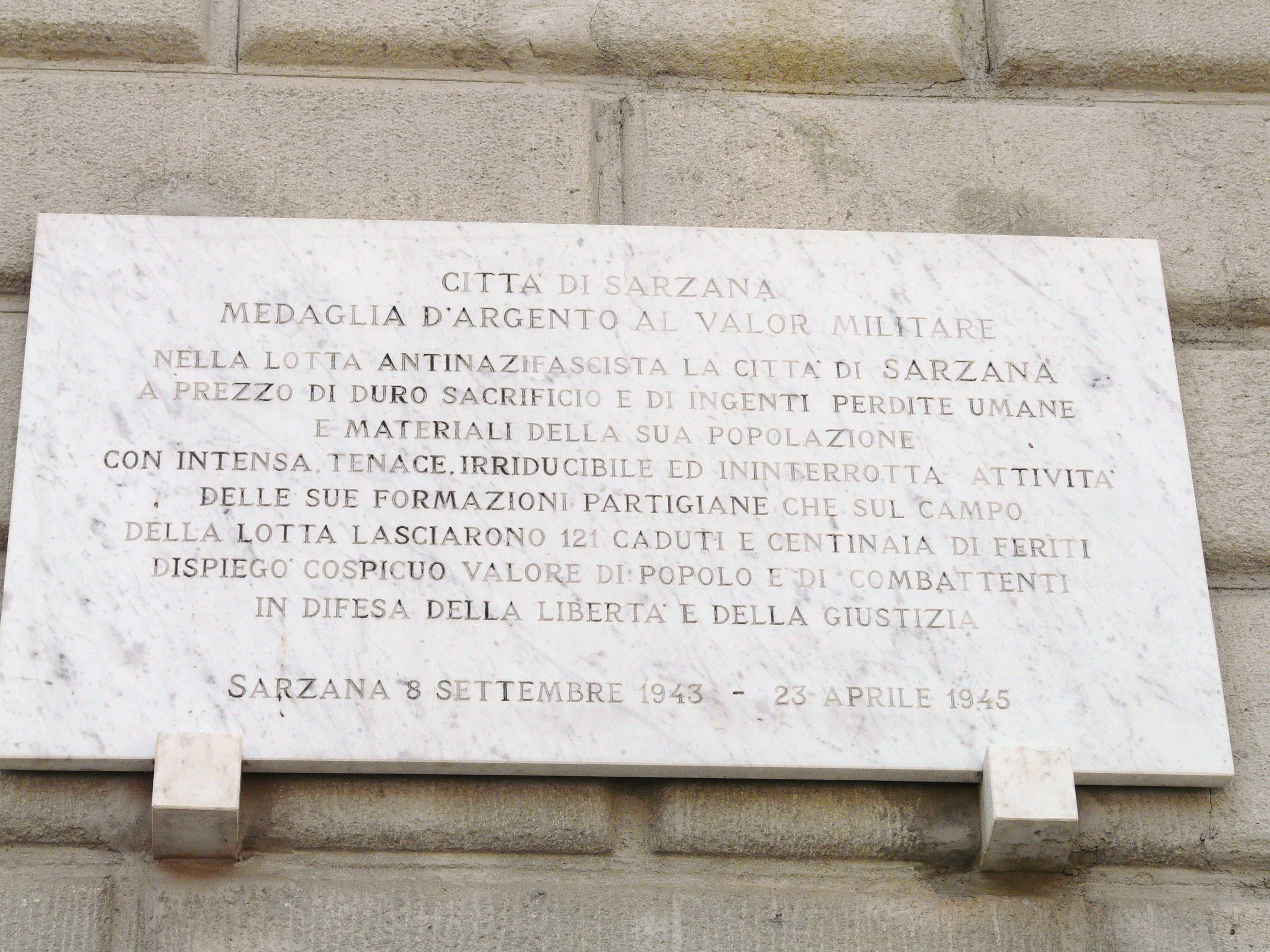 Municipio di Sarzana, Liguria, Italia